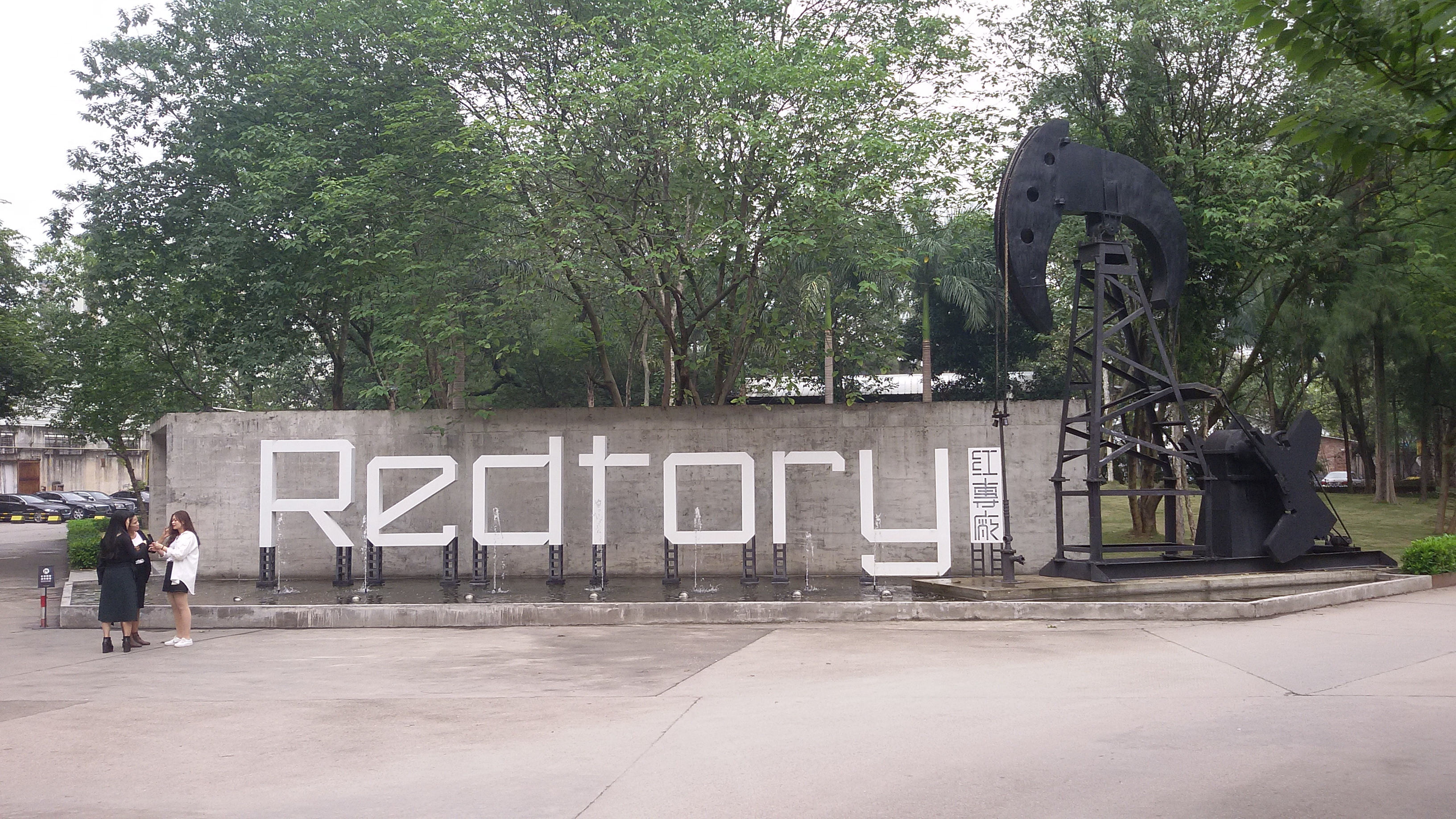 粵語: 紅專廠正門牌坊附近